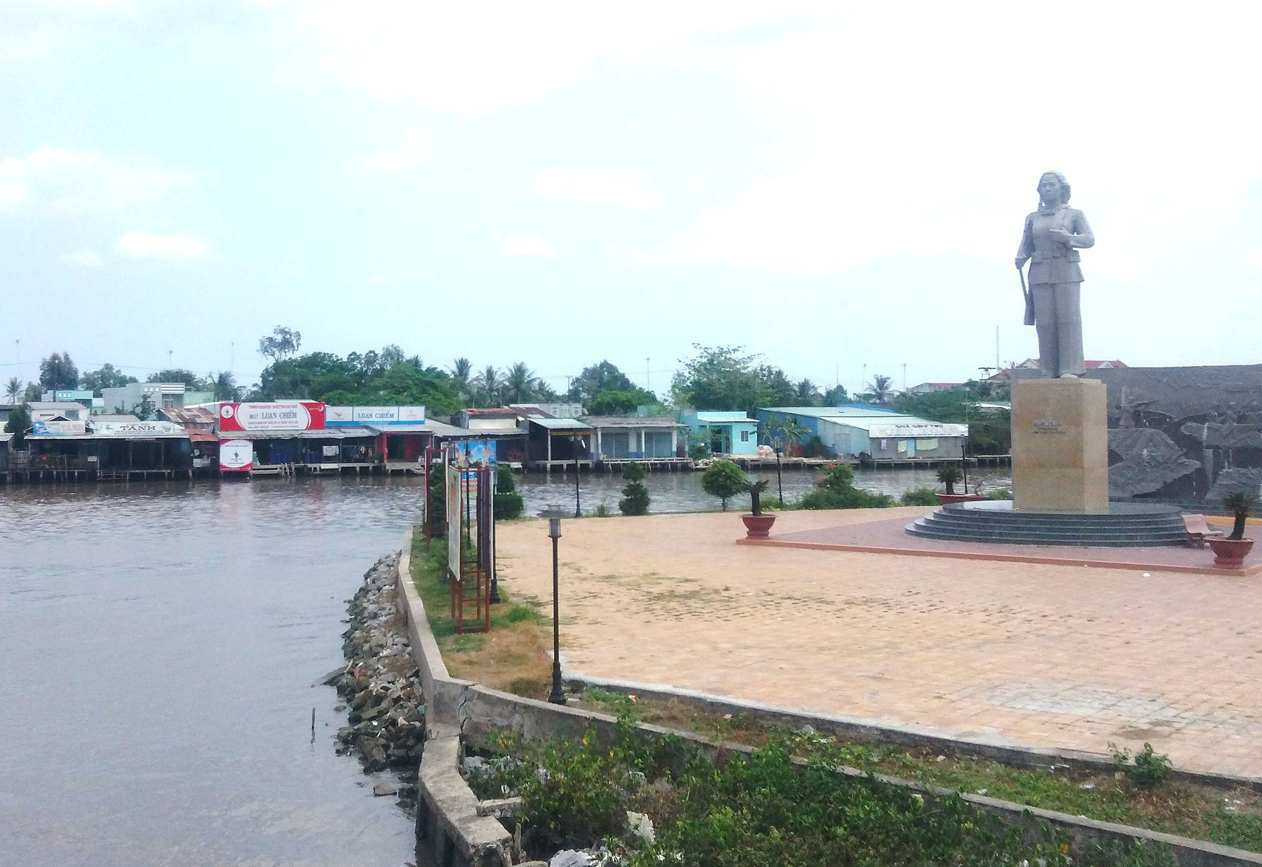 Tượng đài Anh hùng LLVT Dương Thị Cẩm Vân và 1 góc thị trấn Đầm Dơi.